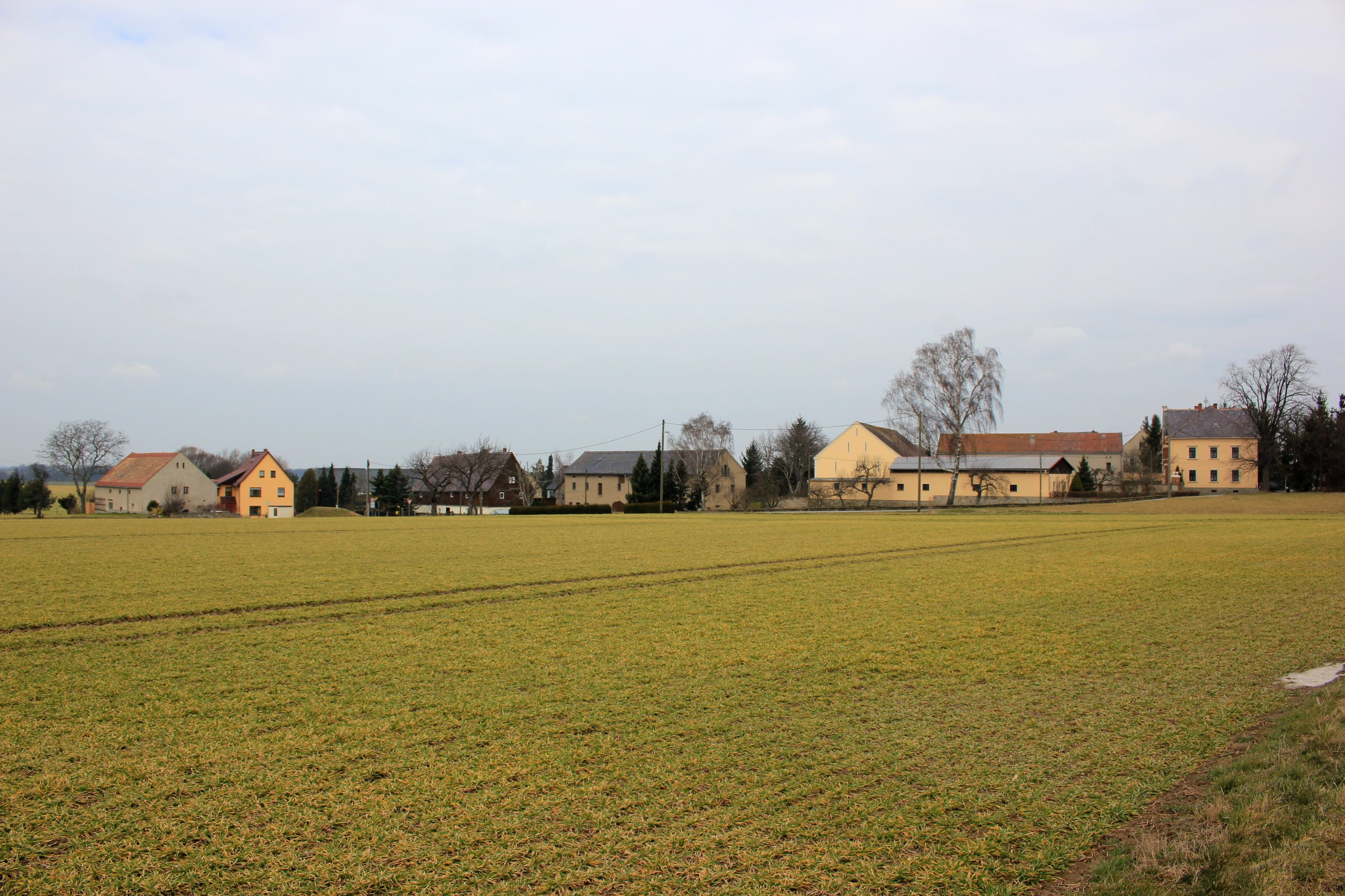 Hornjoserbsce: Napohlad Pozdec.